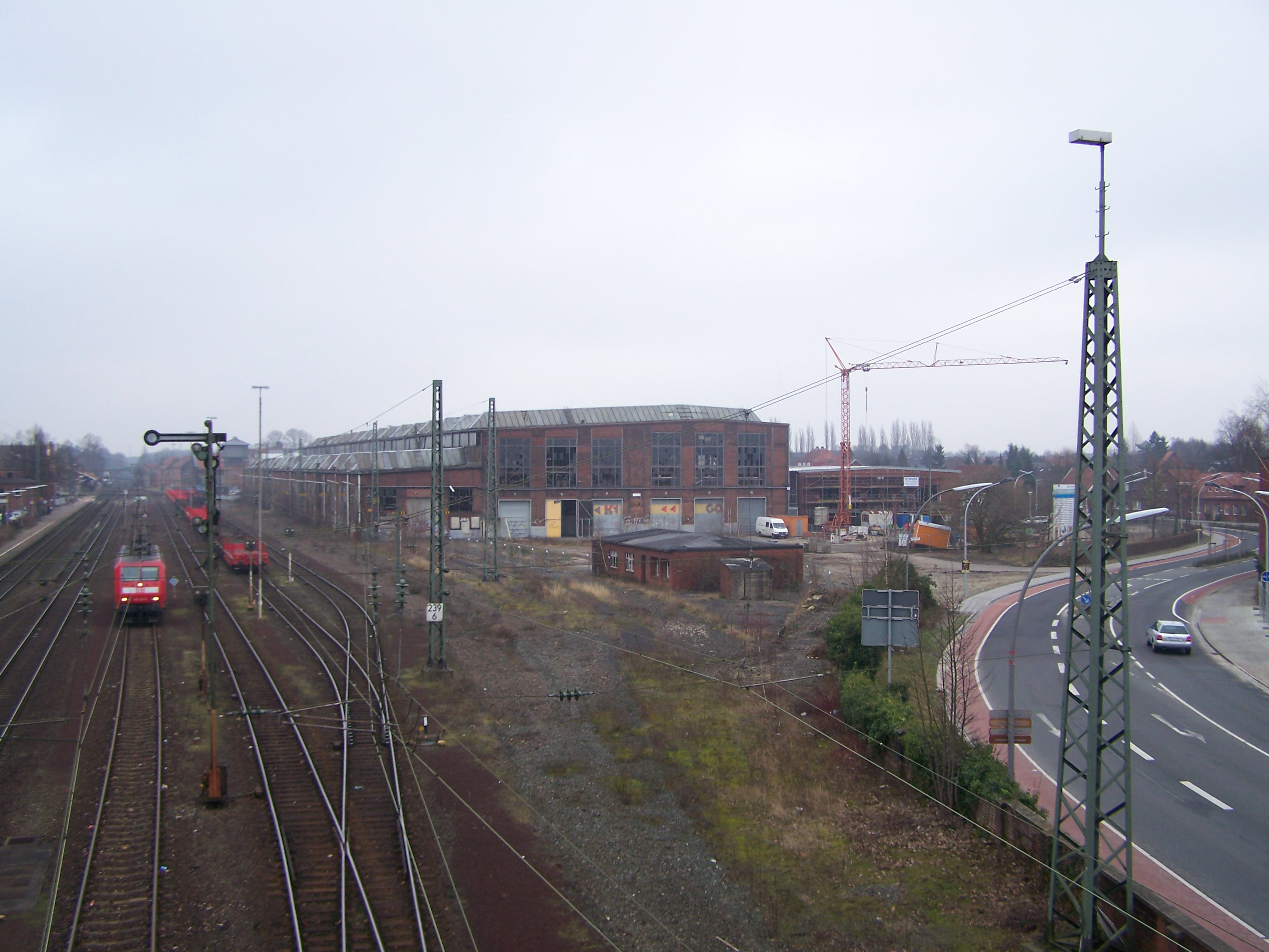 Ehemaliges Ausbesserungswerk Lingen von der Fußgängerbrücke aus gesehen.